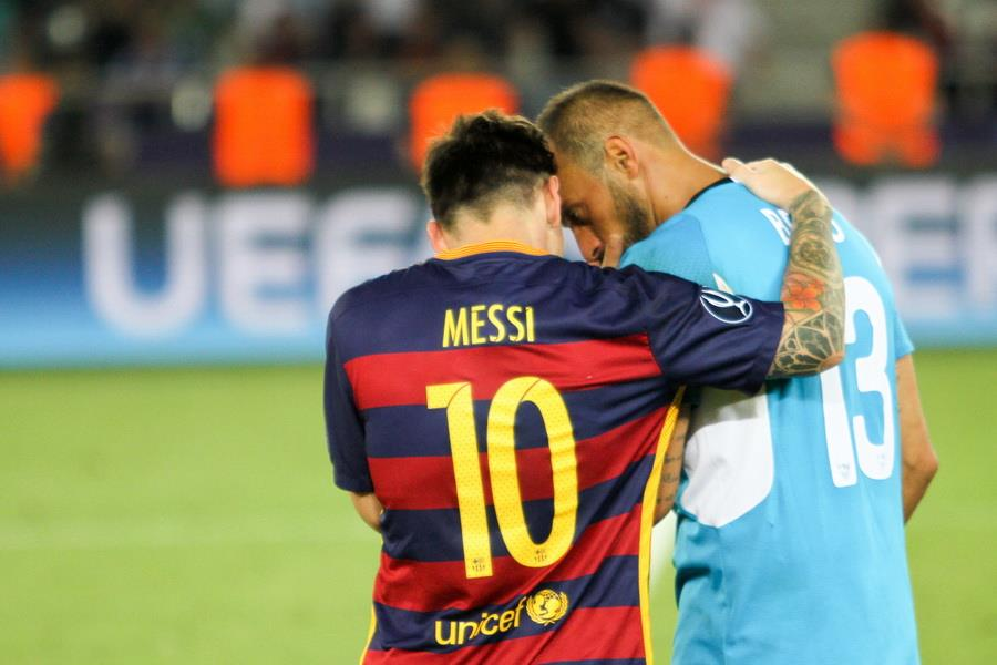 Матч за Суперкубок УЄФА 2015 року у Тбілісі. Грузія